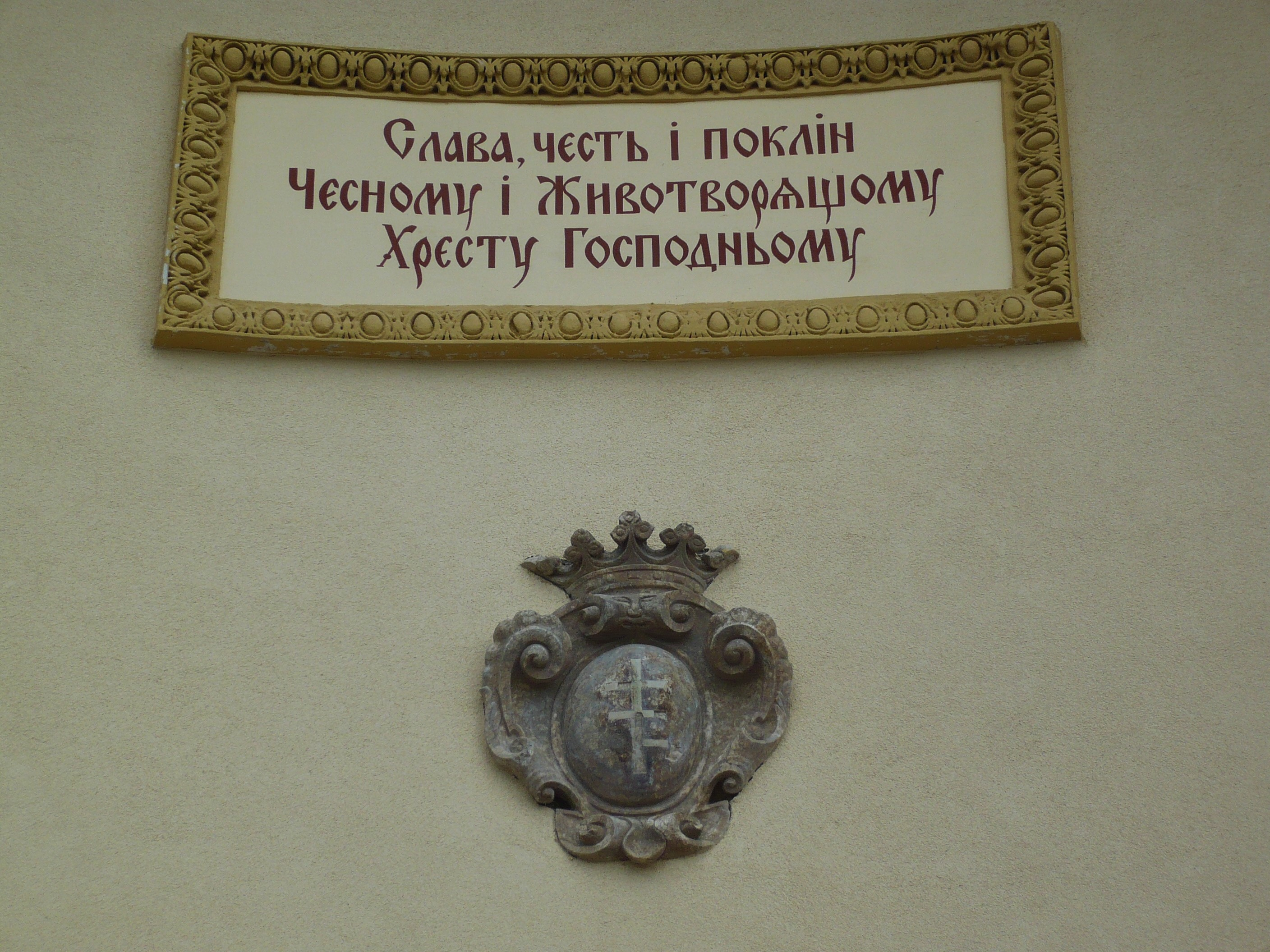 Buczacz.Bazylianie